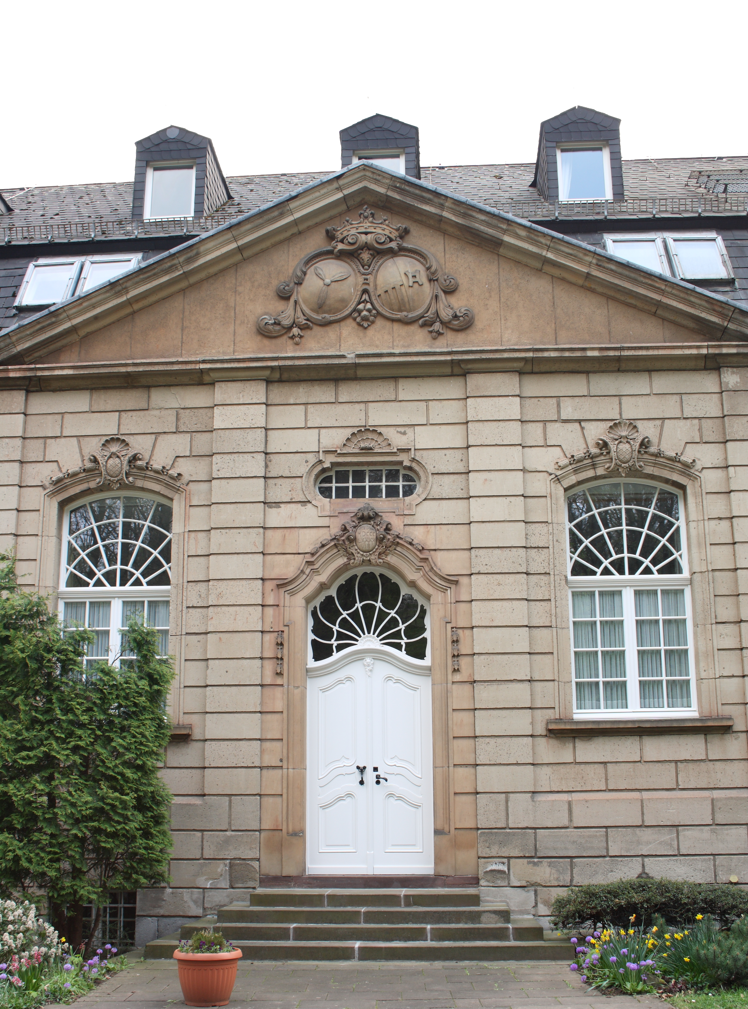 Haus Broich (Kreuzweingarten)